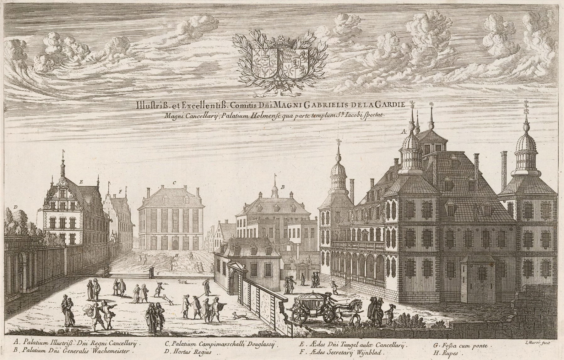 Palatset Makalös från Jakobs kyrka, i fonden Douglaska palatset.